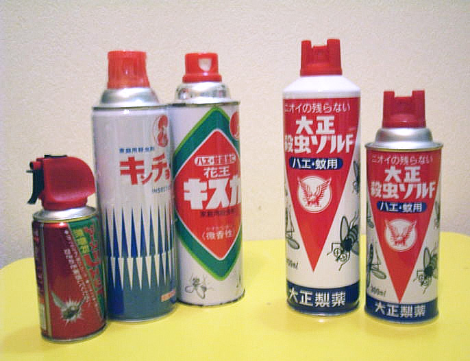 ハエ・蚊用エアゾール剤(左から３番目がキスカ）. ハエ・蚊用エアゾール剤（右から１番目が、大正殺虫ゾルF）. ハエ・蚊用エアゾール剤.